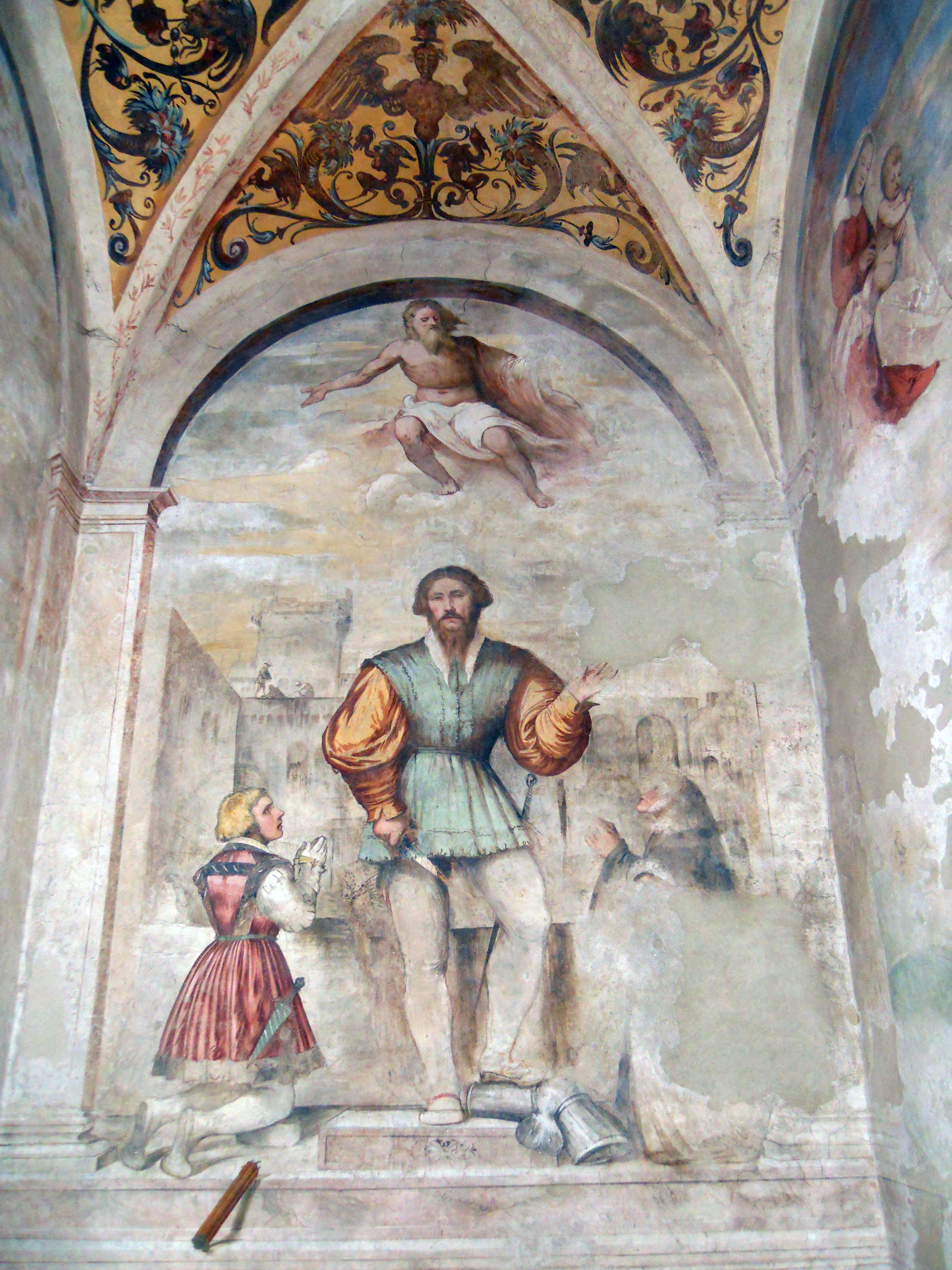 storie di sant'obizio (romanino) chiesa di san salvatore (museo di santa giulia), brescia